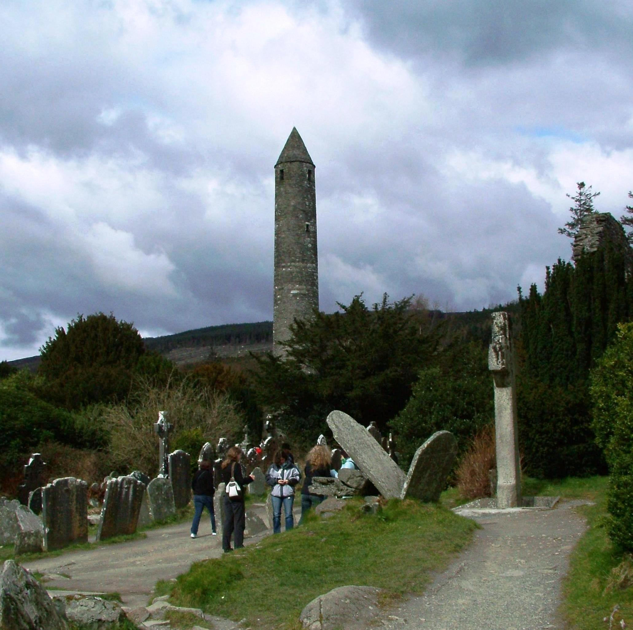 Glendalough, temetői kerek torony (Írország)